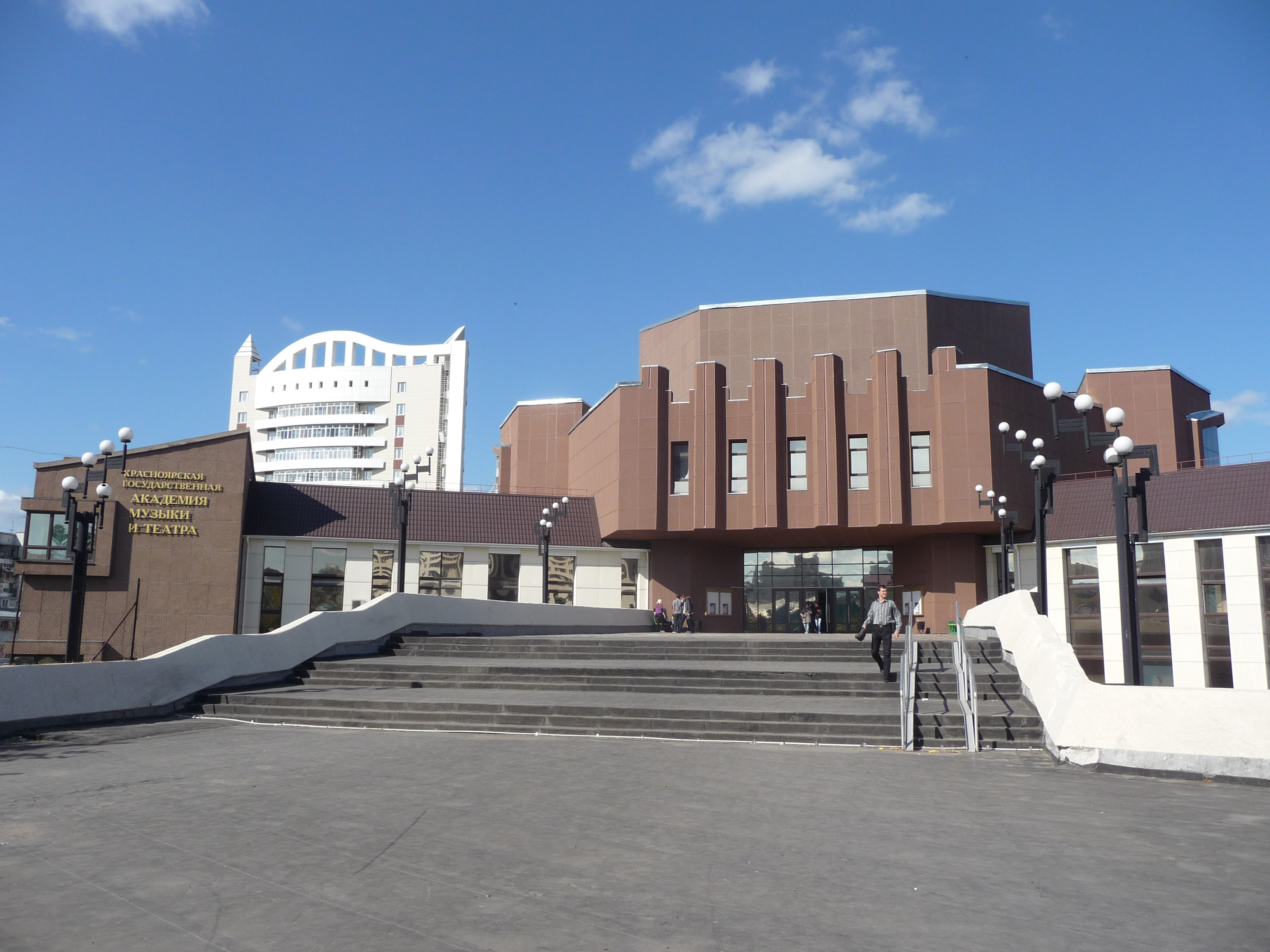 Красноярская государственная академия музыки и театра